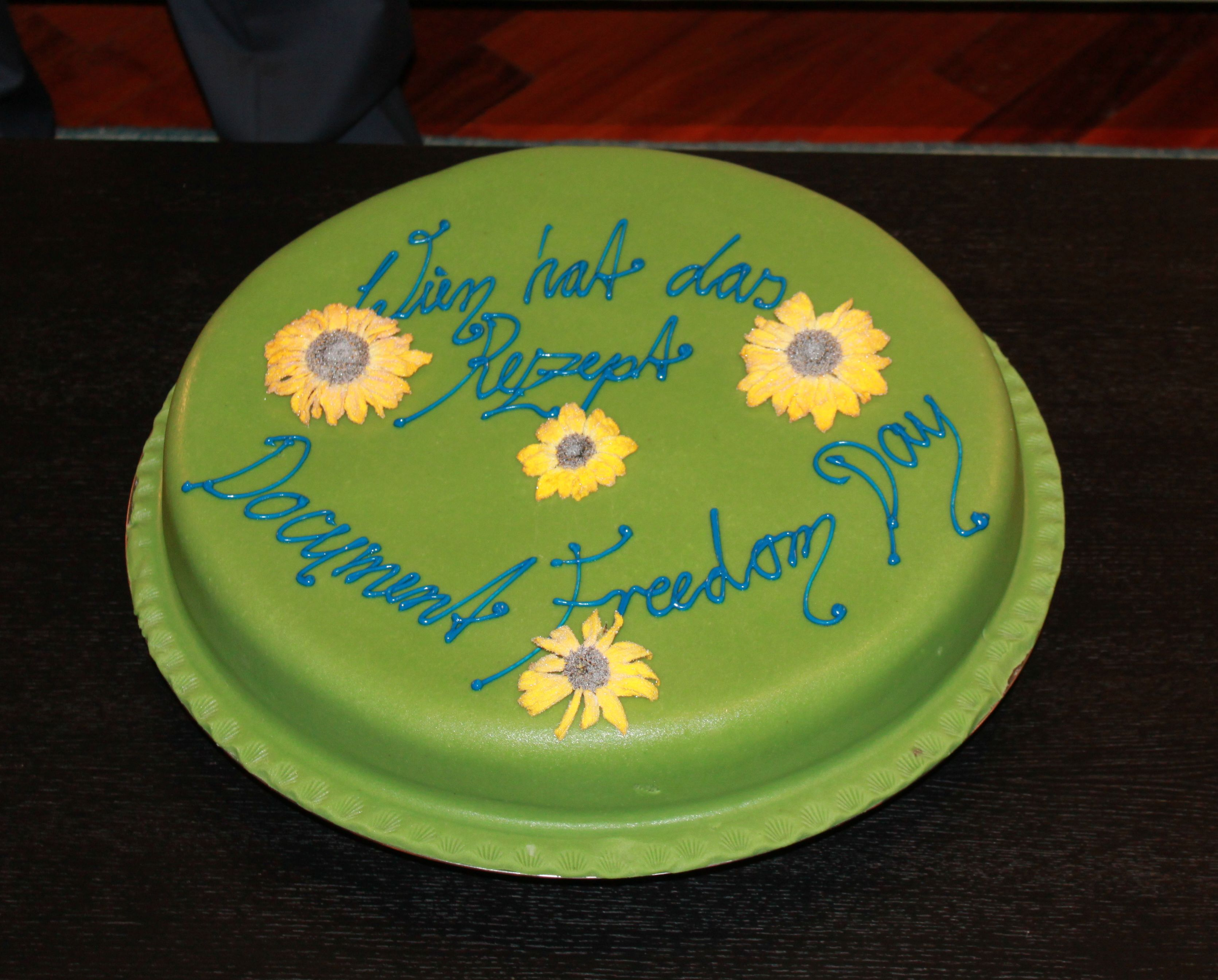 Grüne Torte, unangeschnitten, zum Document Freedom Day für die Stadt Wien, von der Fraktion Bündnis 90/ Die Grünen im Berliner Abgeordnetenhaus